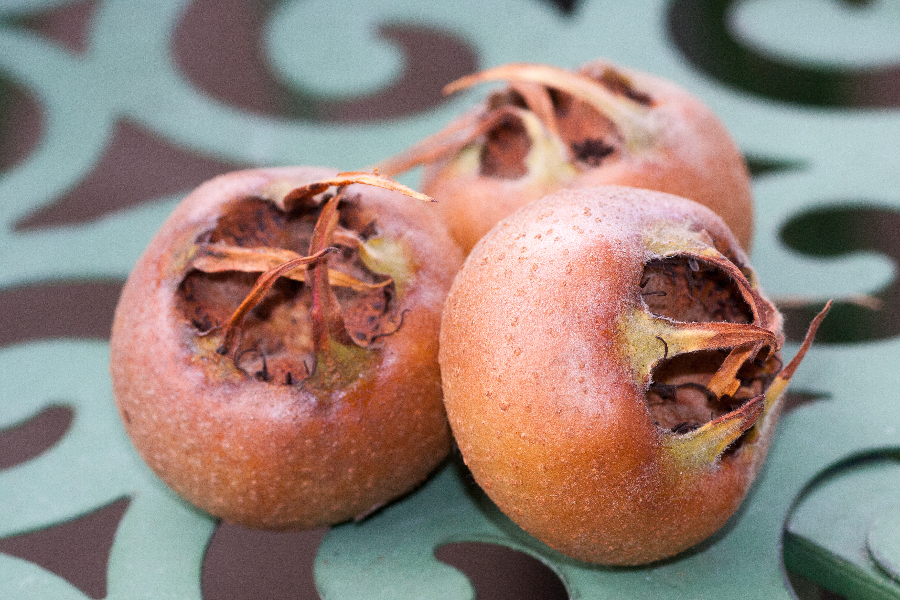 Nahaufnahme von drei Mispel. Sie stammen aus Heidelberg-Handschuhsheim im Jahr 2013.